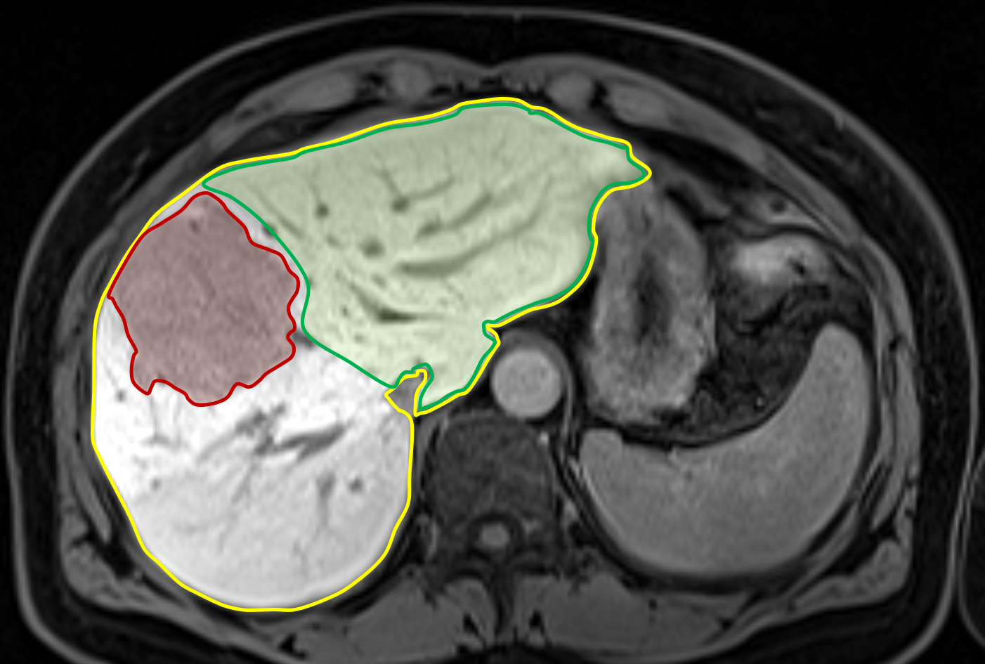 Zur volumetrischen Berechnung werden sämtliche Schnittbilder analog des Beispiels markiert und die Volumina der gesamten Leber (VG), des Tumors (VT) und der Restleber nach OP (VFLRV) mittels Computersoftware bestimmt.